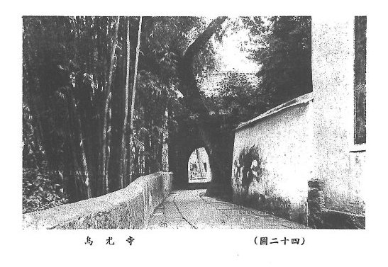 中文（台灣）: 峨眉山老照片